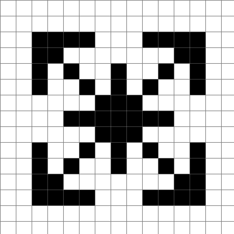 Motif tricot norvégien, spyttklysa